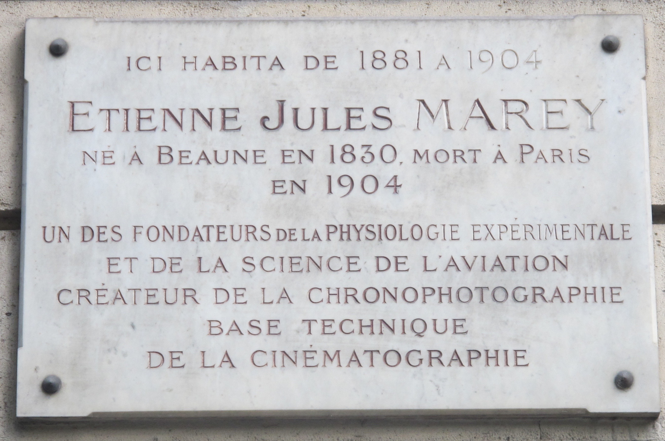 Plaque en hommage au médecin et physiologiste Étienne-Jules Marey, au 11 boulevard Delessert (Paris, 16e).